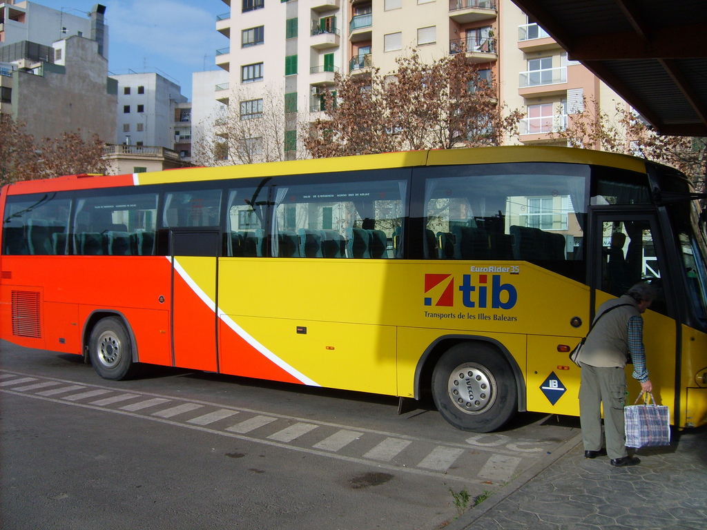 Autobús de TIB (Transport de les Illes Balears) aparcat a Mallorca